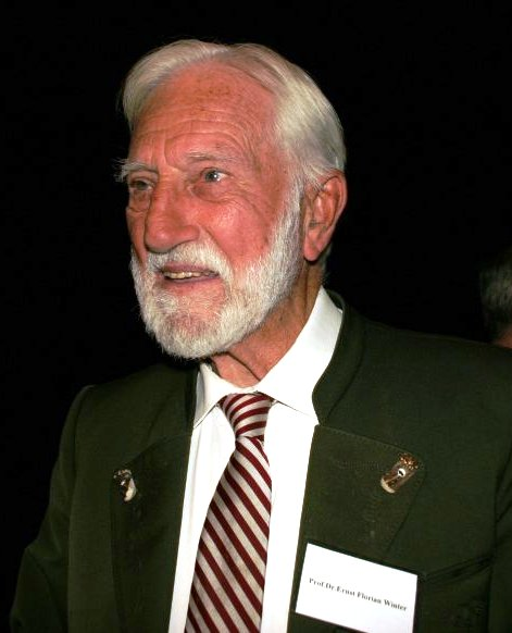 Ernst Florian Winter bei den 16. Braunauer Zeitgeschichte Tagen